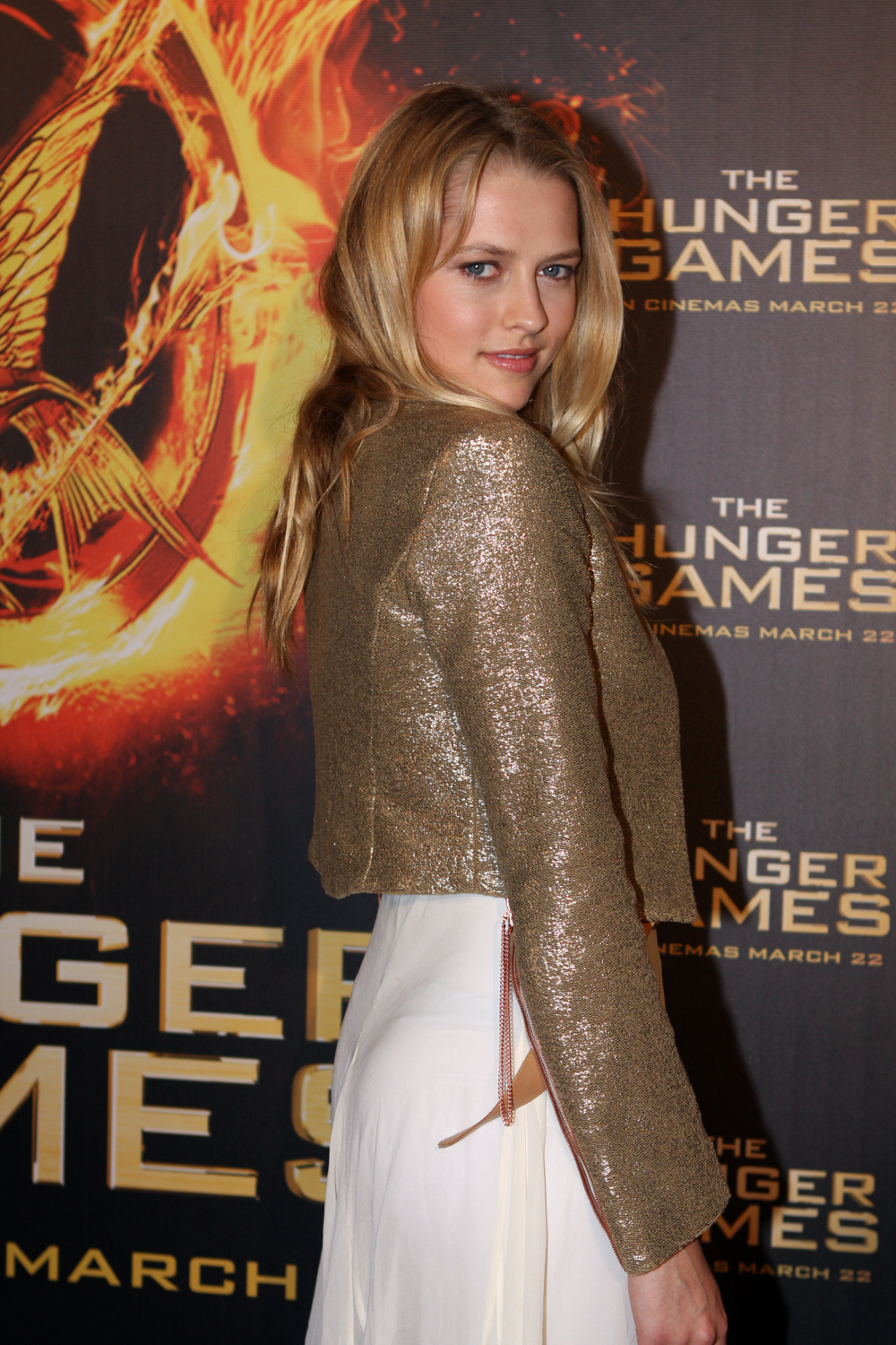 The Hunger Games Sydney Premiere And Review